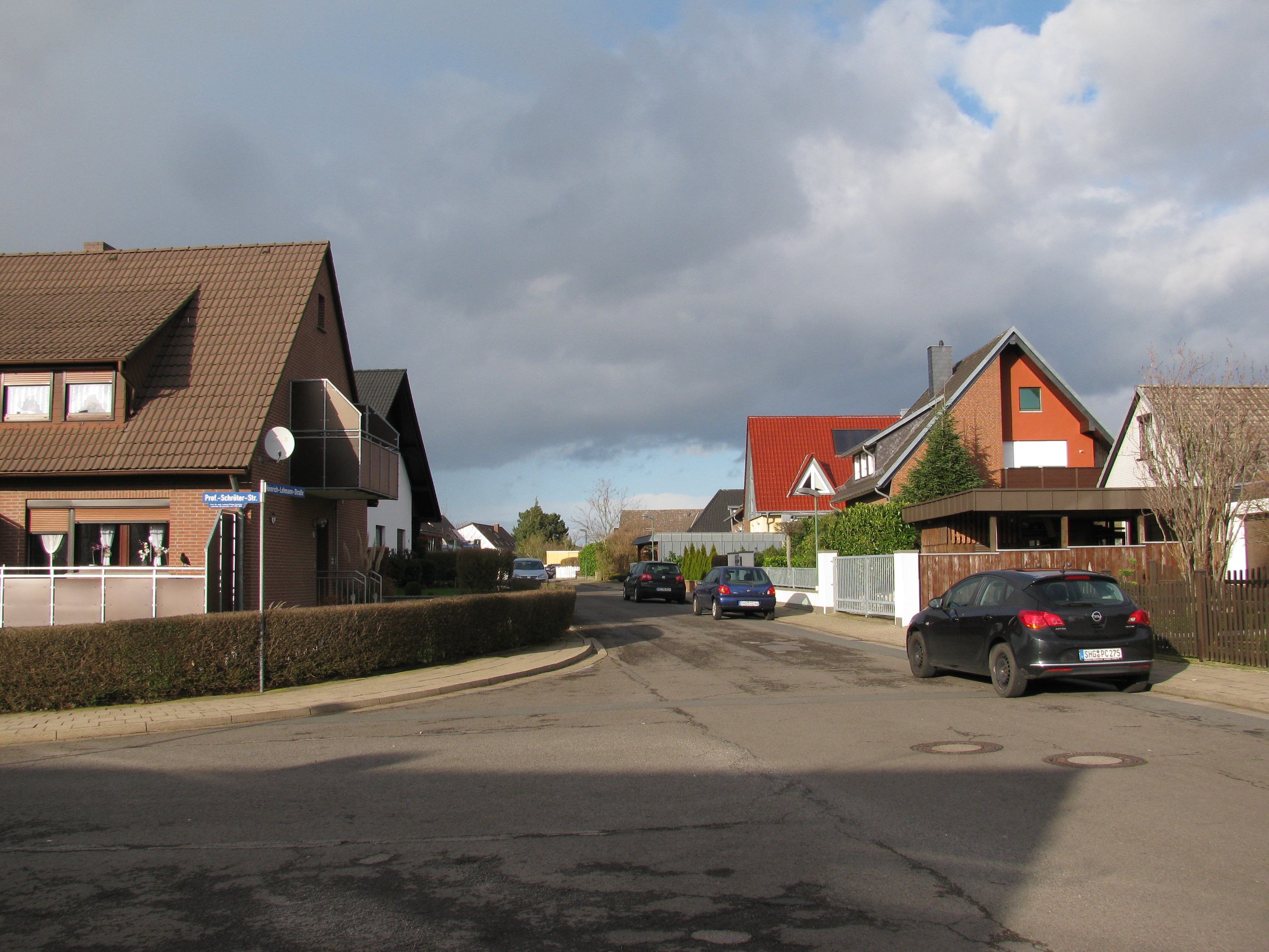 Blick von der Professor-Schröter-Straße in Bad Nenndorf in die Heinrich-Lehmann-Straße nach Norden